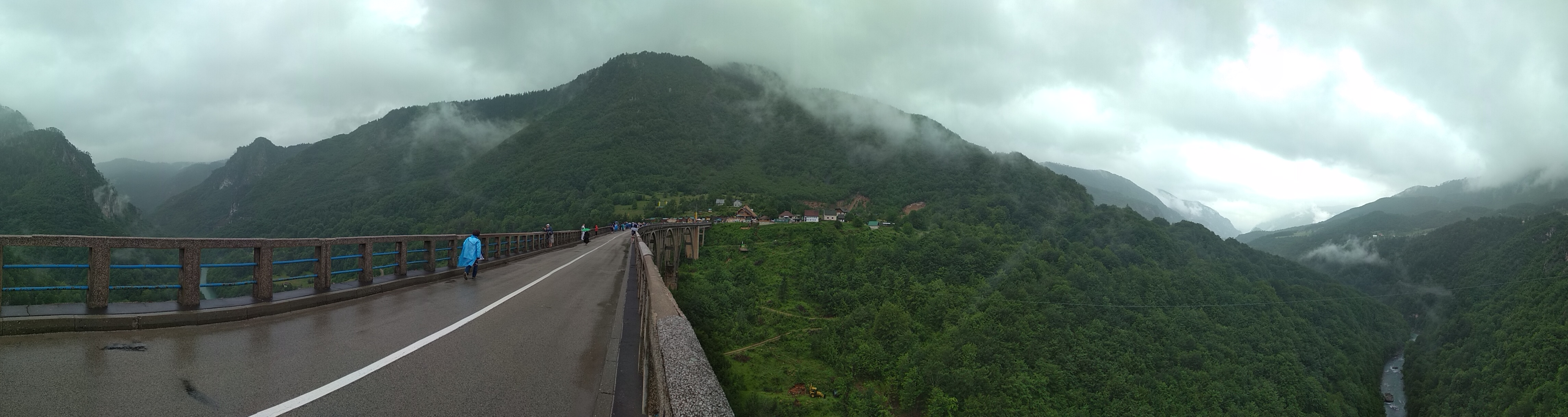 Мост Джурджевича, Черногория.